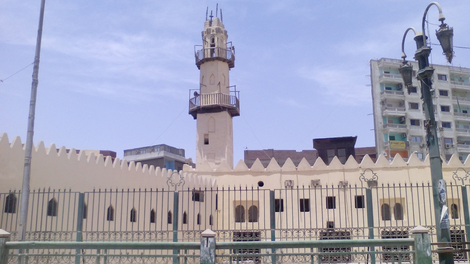 مسجد العمراوي بمحافظة المنيا